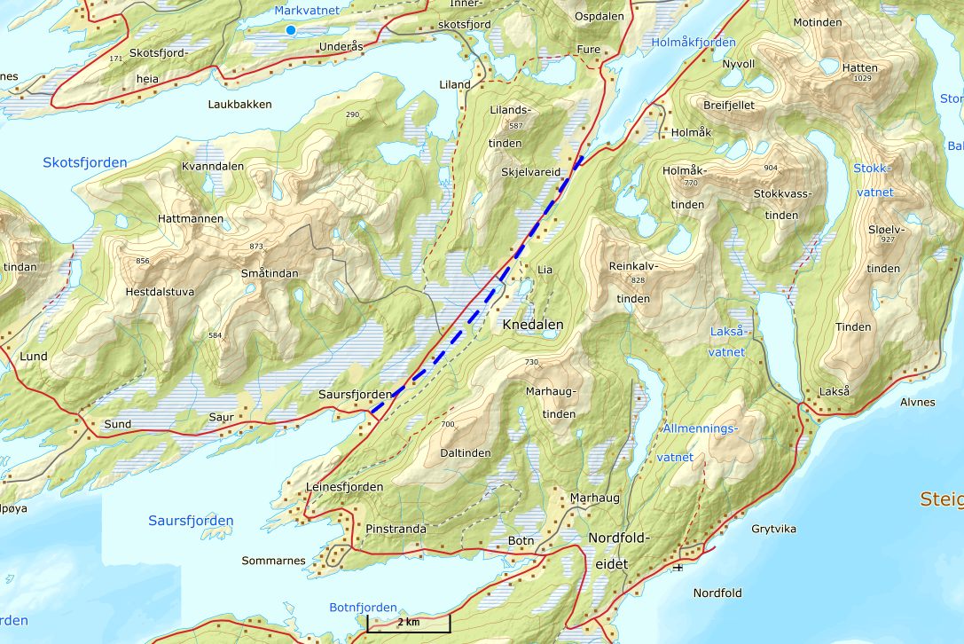 Den stiplede blå linjen viser Skjelvareidet på kartet. Kartet er utklipp fra Norgeskart.no